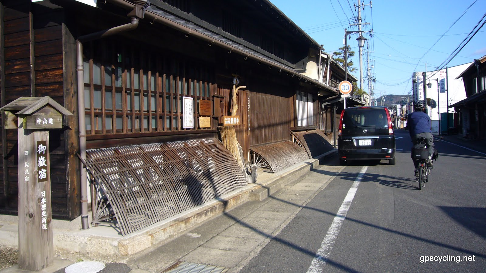 御嶽宿